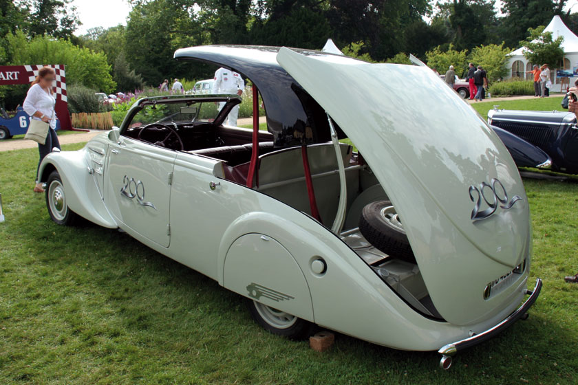 1938 Peugeot 402 L E4Y